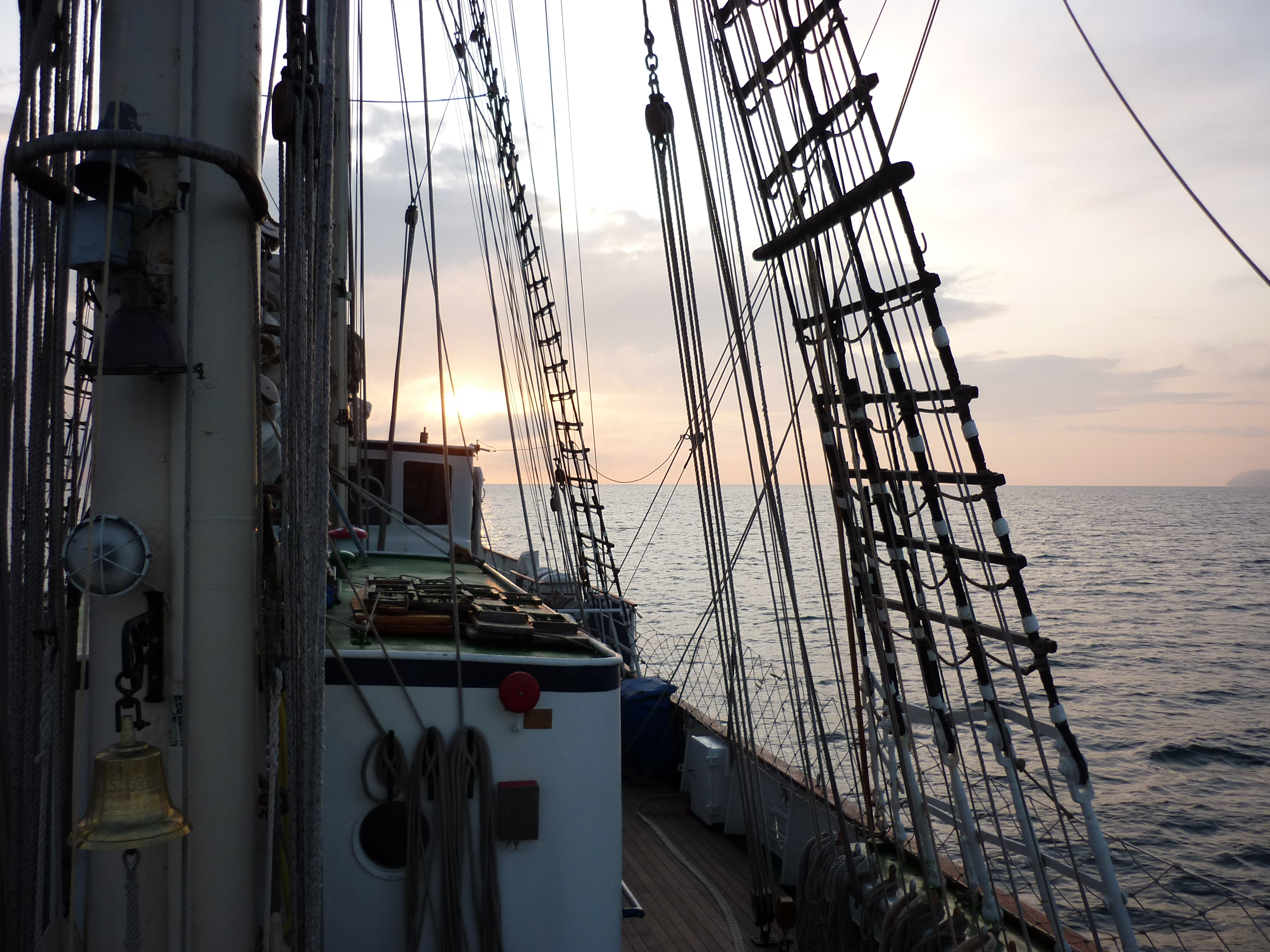 Wanten des SSS Greif, Backbordseite